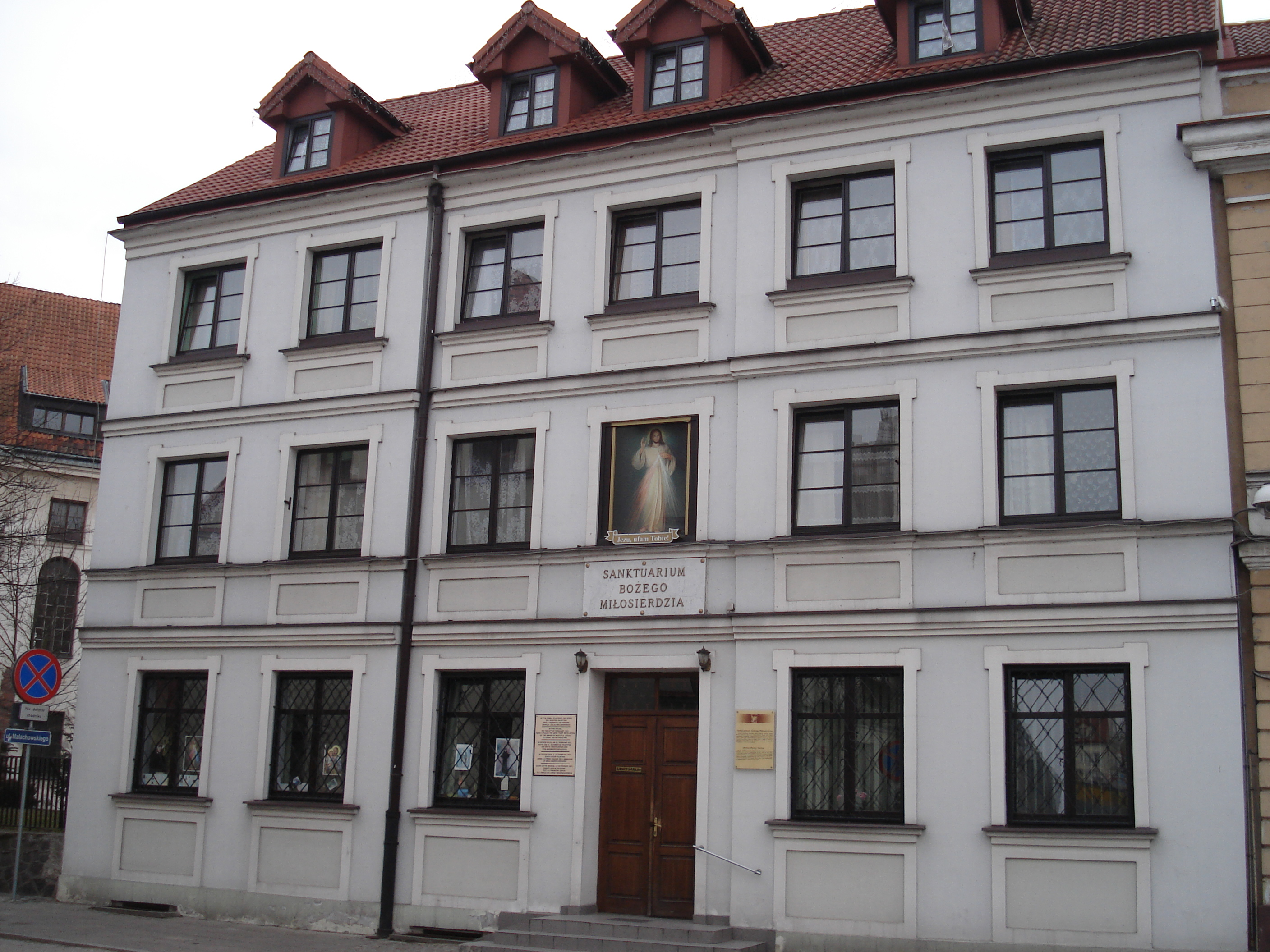 Sanktuarium Miłosierdzia Bożego w Płocku